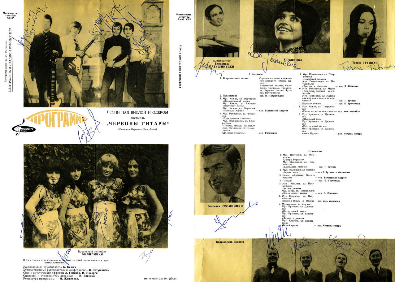 Program koncertu Filipinek, zespołu Czerwone Gitary i towarzyszących im artystów w ramach trasy „Piosenki znad Wisły i Odry” jesienią 1970 r. w ZSRR